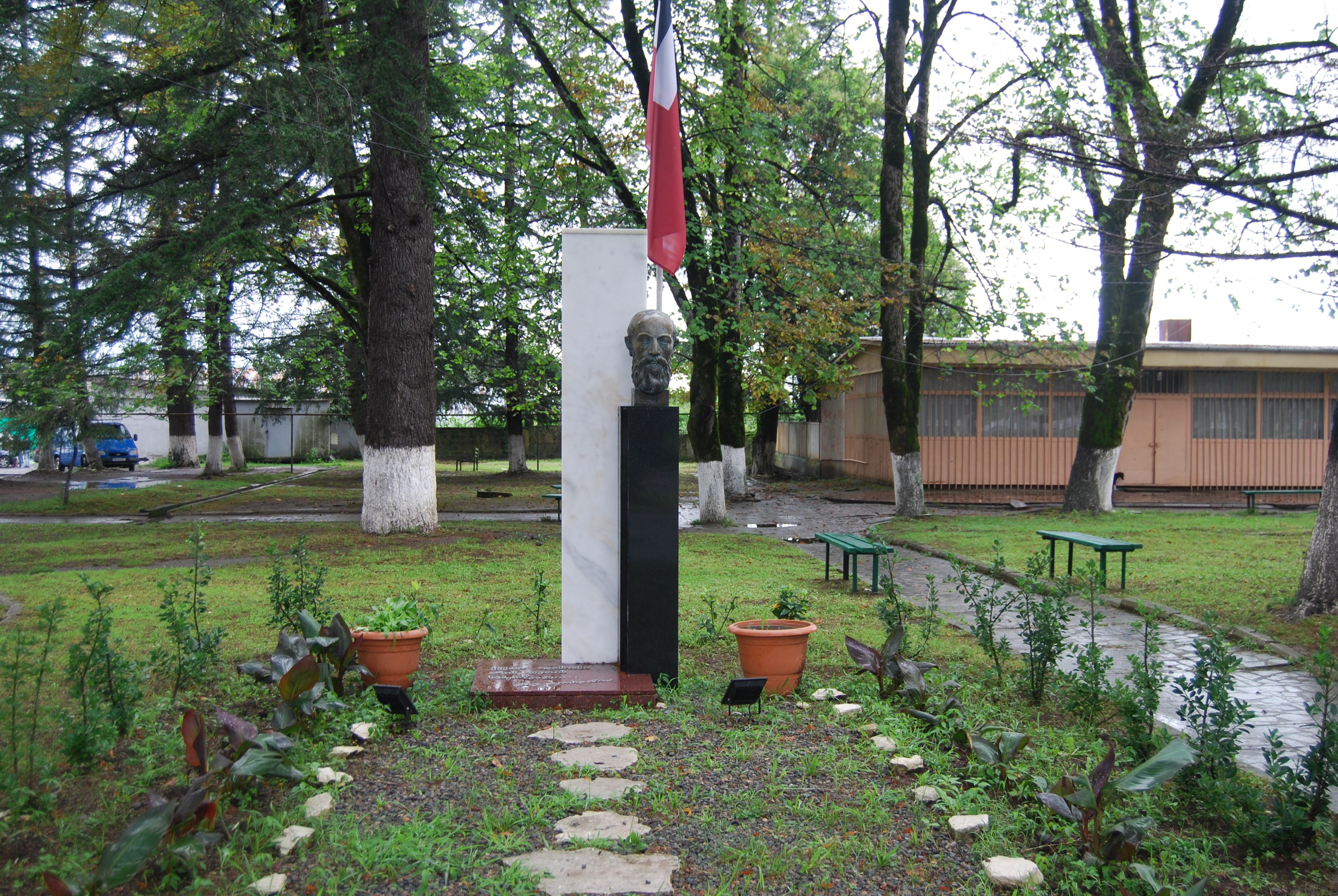 ნოე ჟორდანიას ბიუსტი და სკვერი